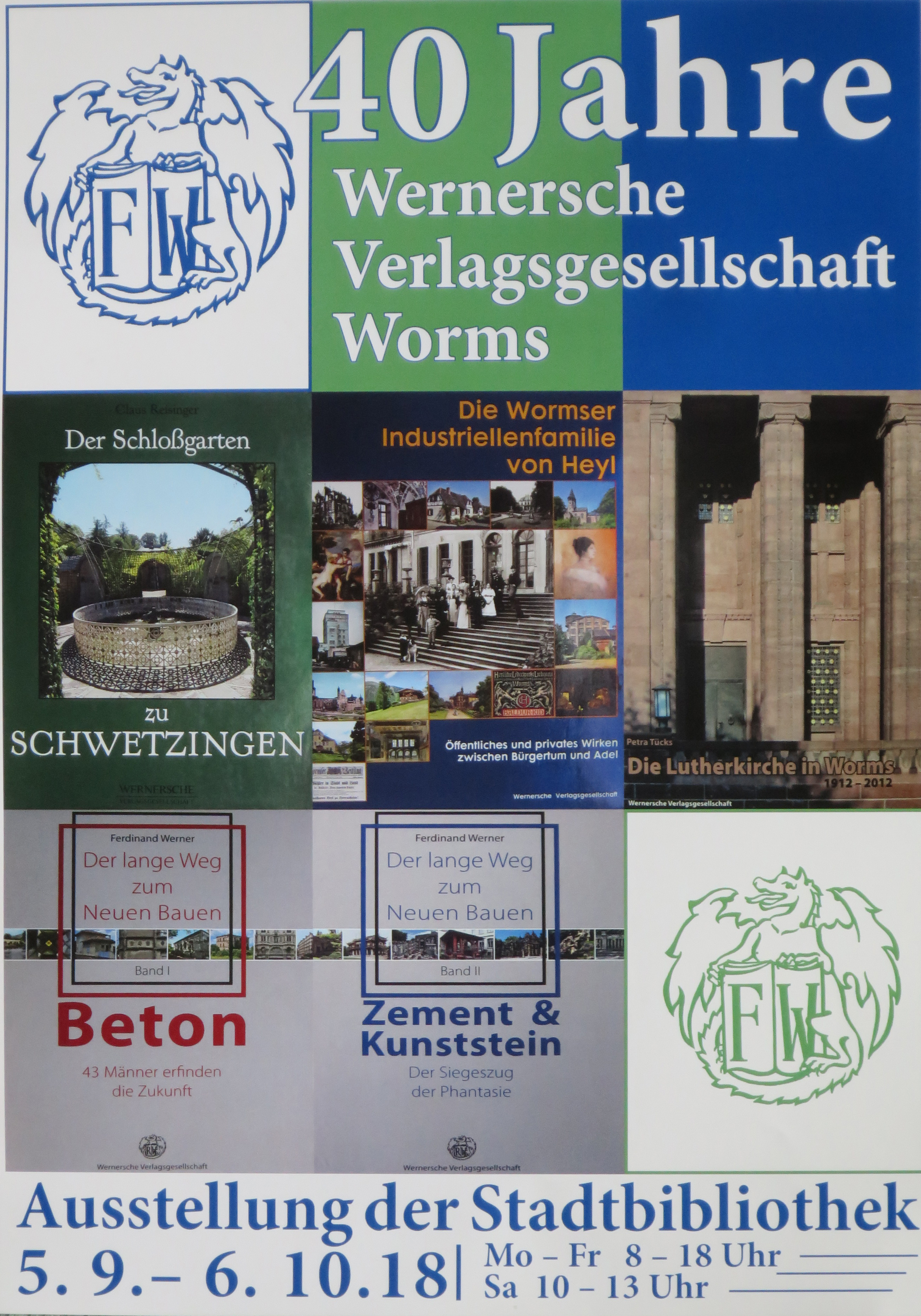 Plakat zur Ausstellung: 40 Jahre Wernersche Verlagsgesellschaft in der Stadtbibliothek Worms